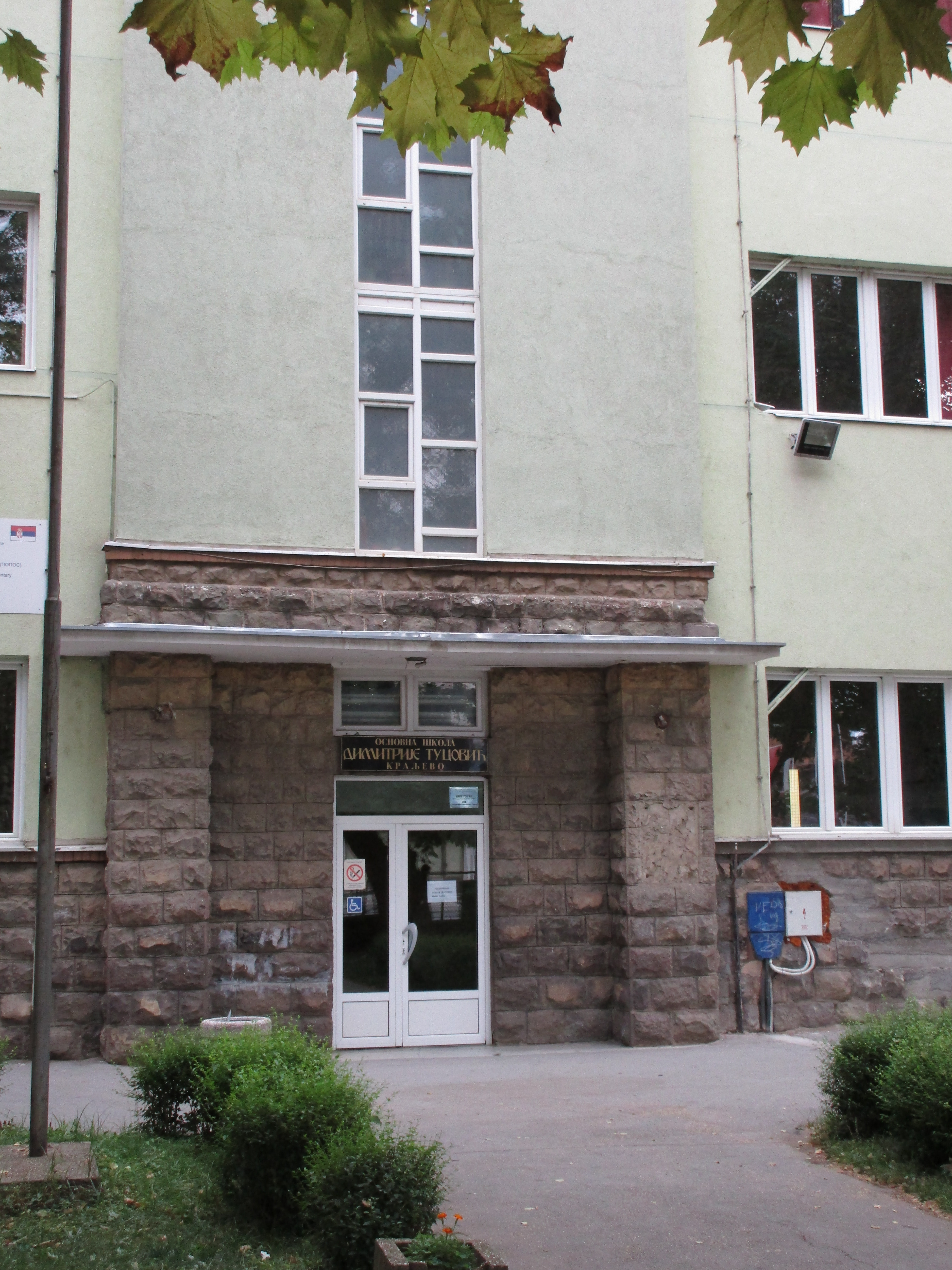 Srpski (latinica): Osnovna škola Dimitrije Tucović, Kraljevo